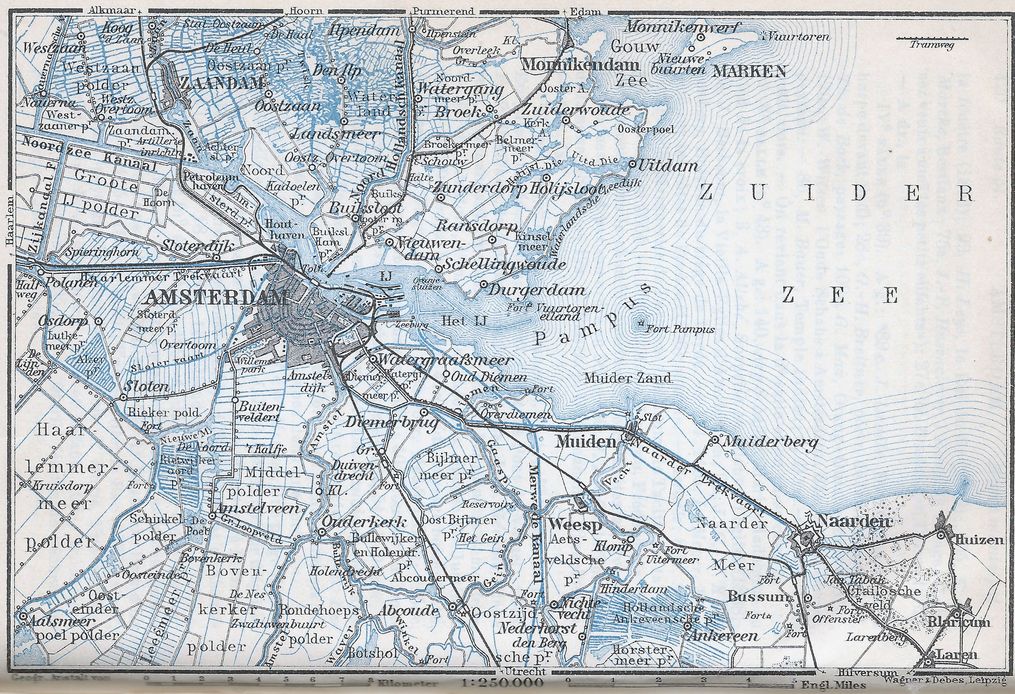 Inlegkaart van Amsterdam en omgeving uit de Baedeker reisgids van 1905. Daarin zijn de streektramroutes te zien van de Gooische en de Waterlandse tram.